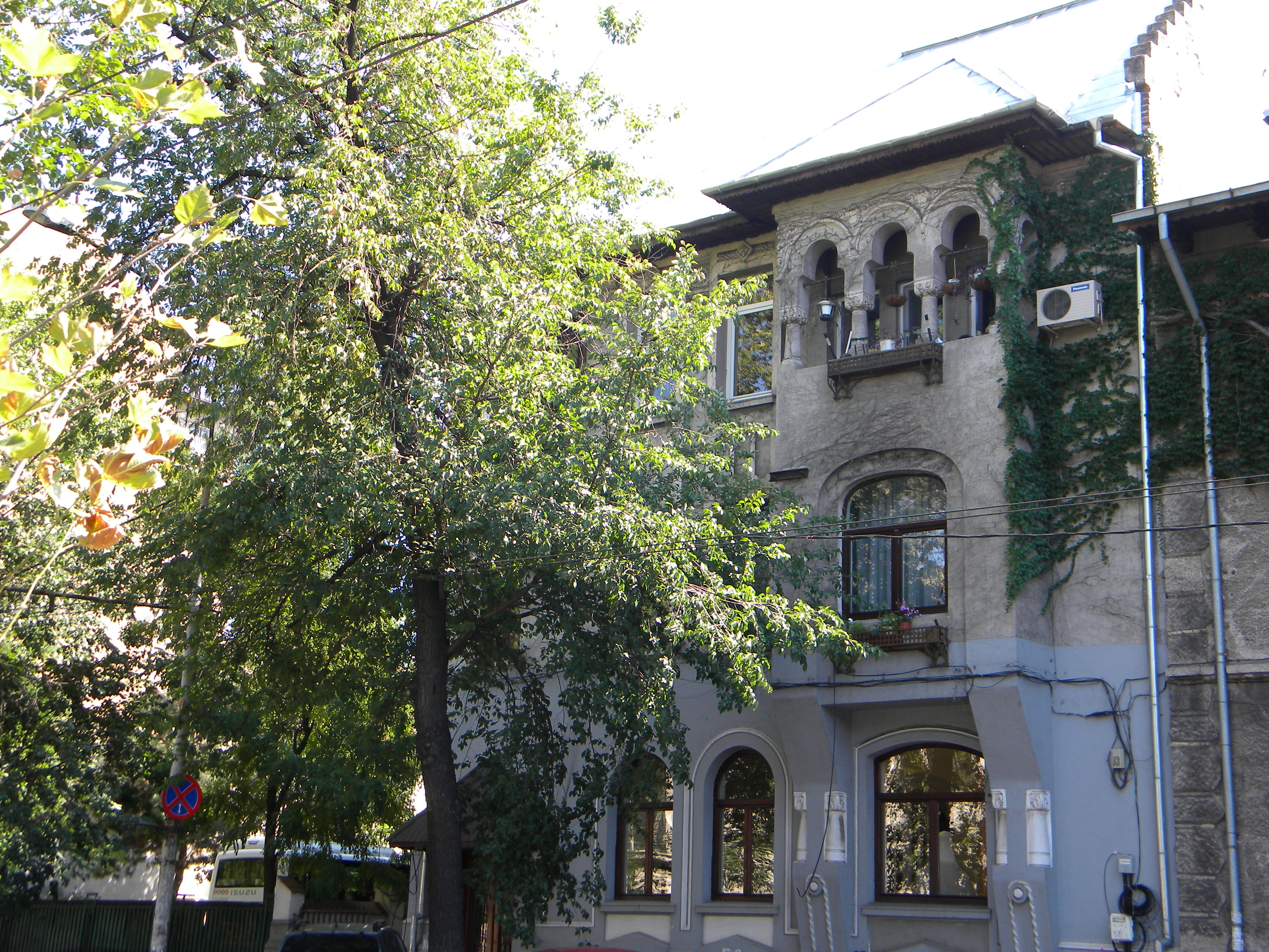 Imobil pe Bd. pache Protopopescu nr. 6, Bucuresti sect. 2